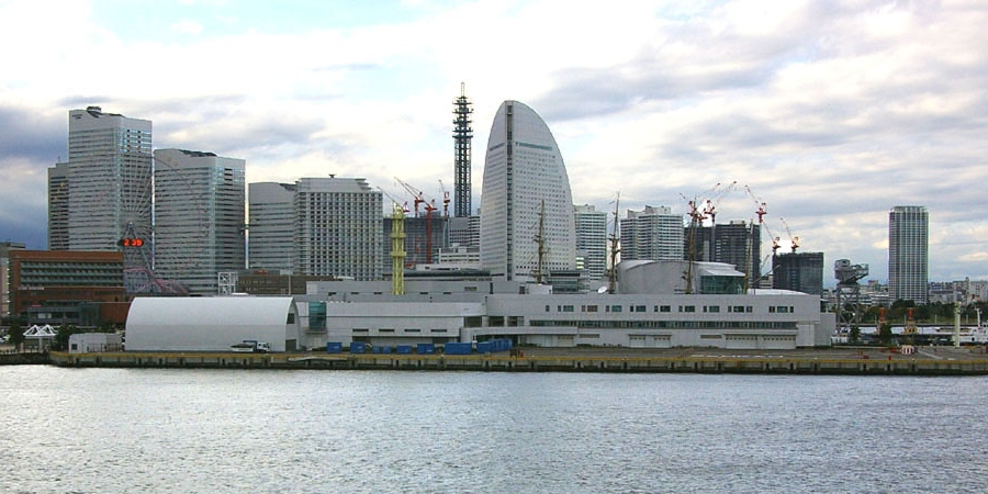 Japan Coast Guard 3rd region yokohama buildings, yokohama, japan.